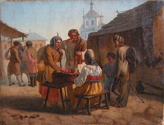 Калистов (Каллекстов) Василий Ефимович. Продажа кваса. 1862 г.